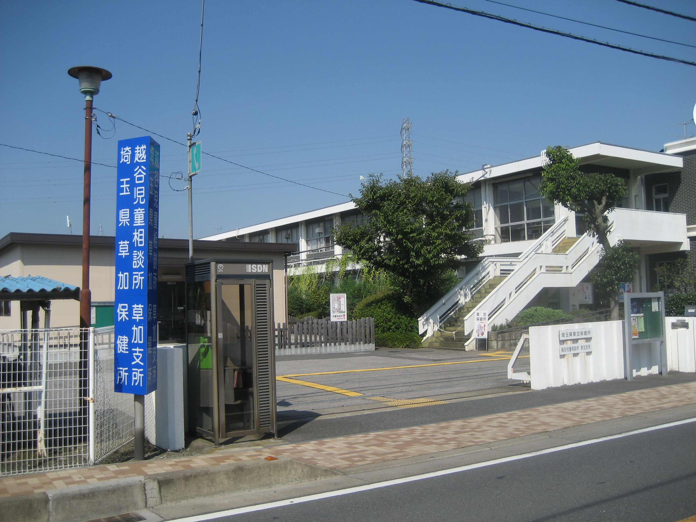 埼玉県草加保健所・越谷児童相談所草加支所庁舎